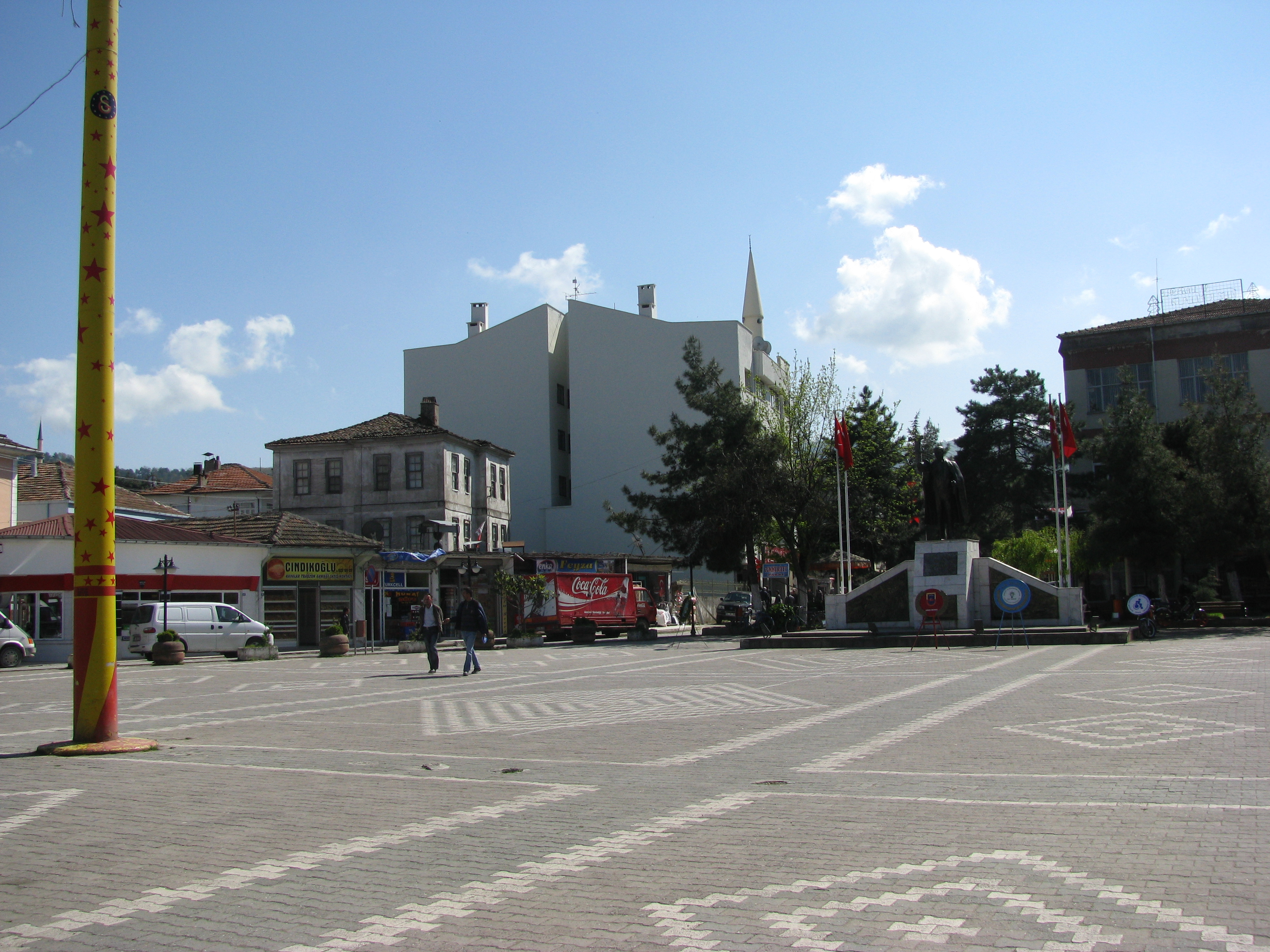 Alaçam Meydanı.